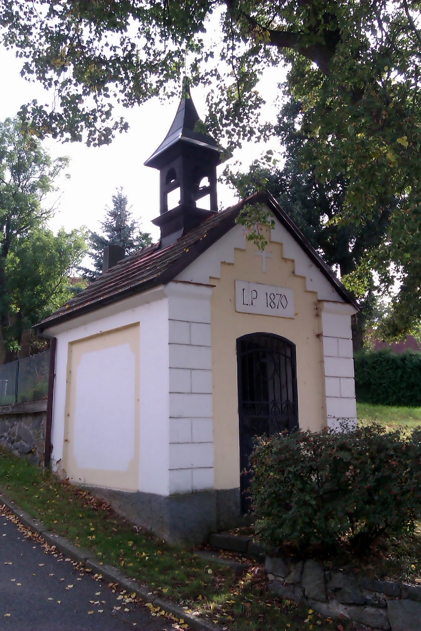 Kaplička Nanebevzetí P. Marie (Přestavlky)